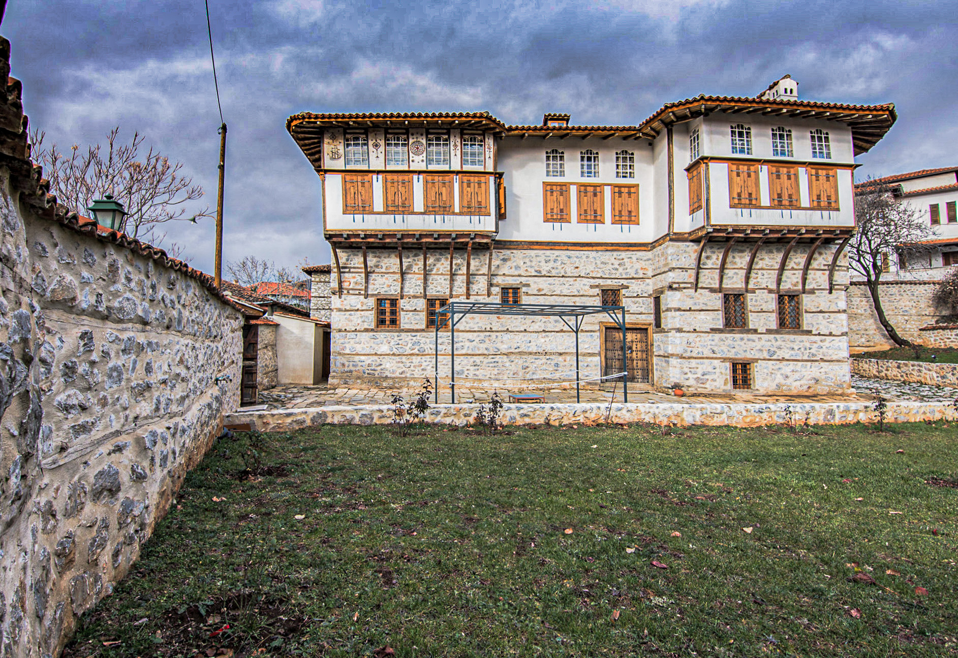 Αρχοντικό Πούλκως